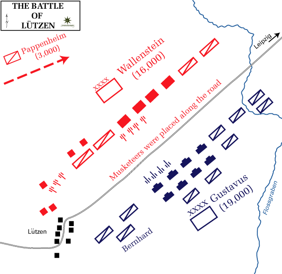 Battle of Lützen (1632)